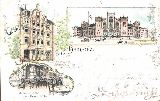 Lithographie Hannover, Gasthaus C. Elling, Artilleriestrasse, Römerecke, Packhof, Aussen- u. Innenansichten